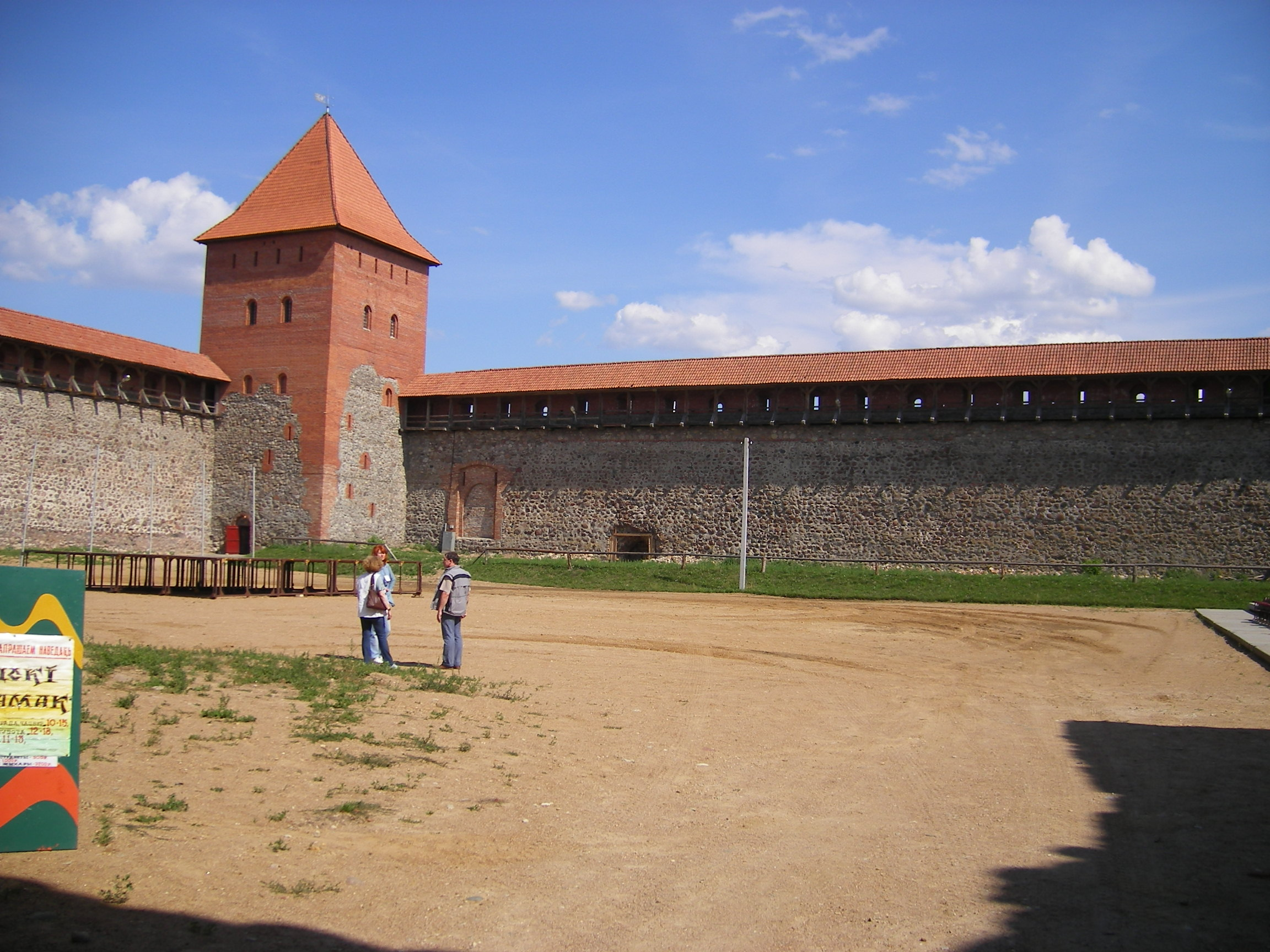 Lida, castle